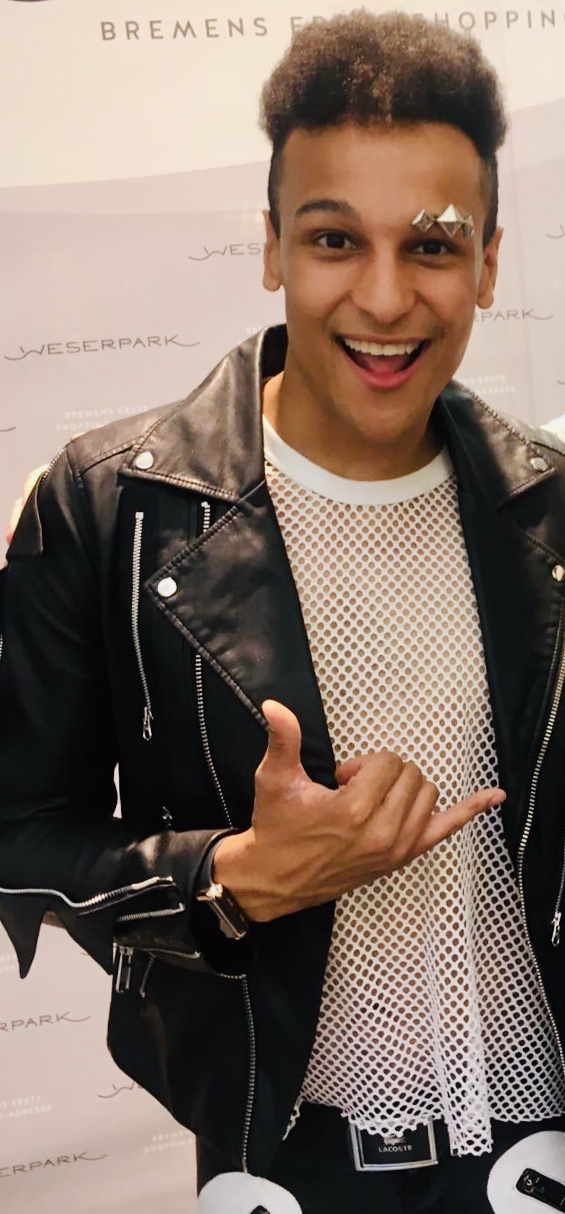 Dschungelkönig Prince Damien bei einer Autogrammstunde im Weserpark in Bremen (2020)